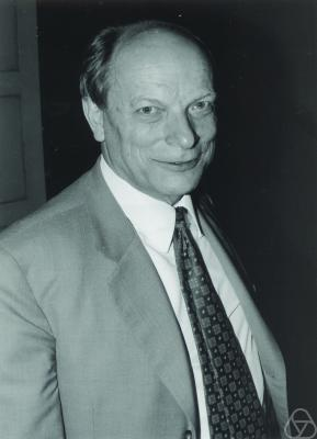 Foto di Hans Hermes